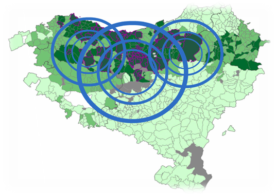 Arnasguneetatik zabal daiteke euskara Euskal Herriko beste txoko batzuetara.